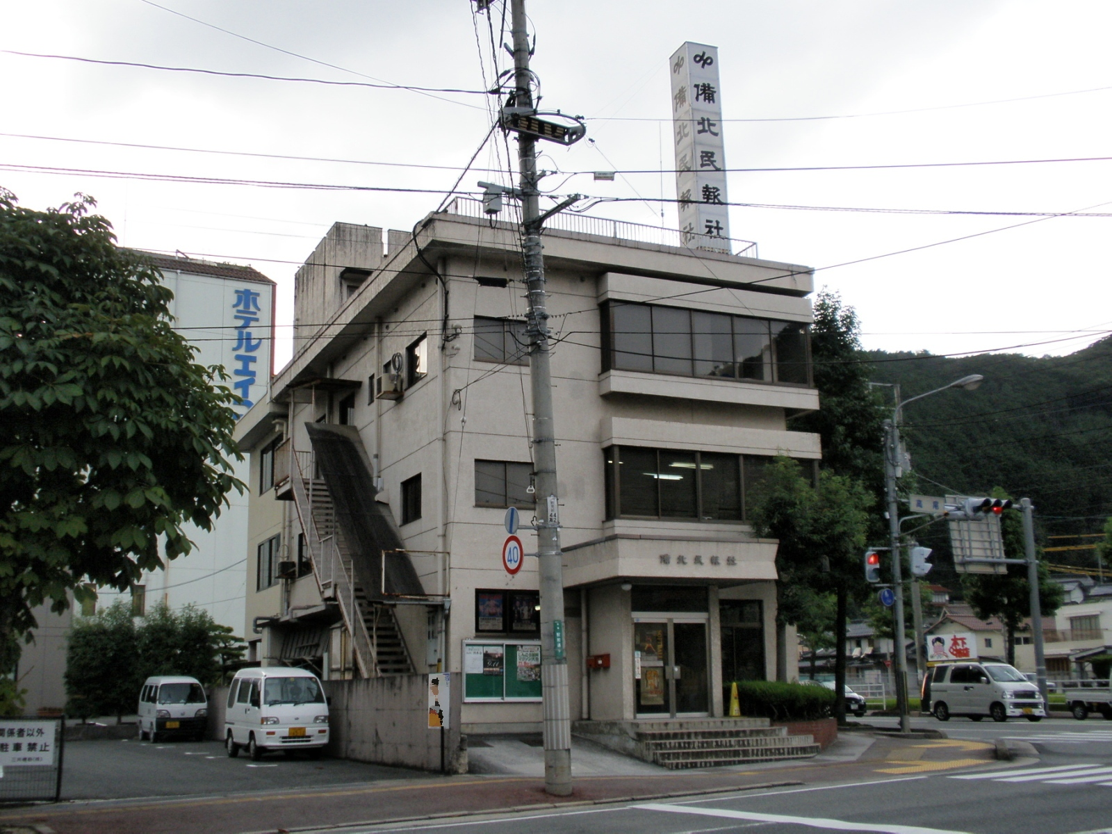 備北民報社。